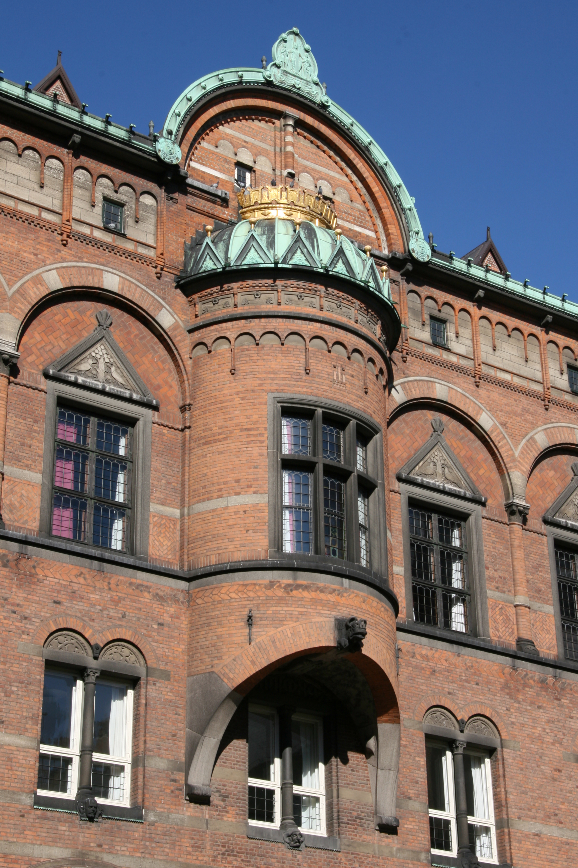 Københavns Rådhus, Rådhushaven. Town Hall of Copenhagen, The garden. Wall detail. Karnap.